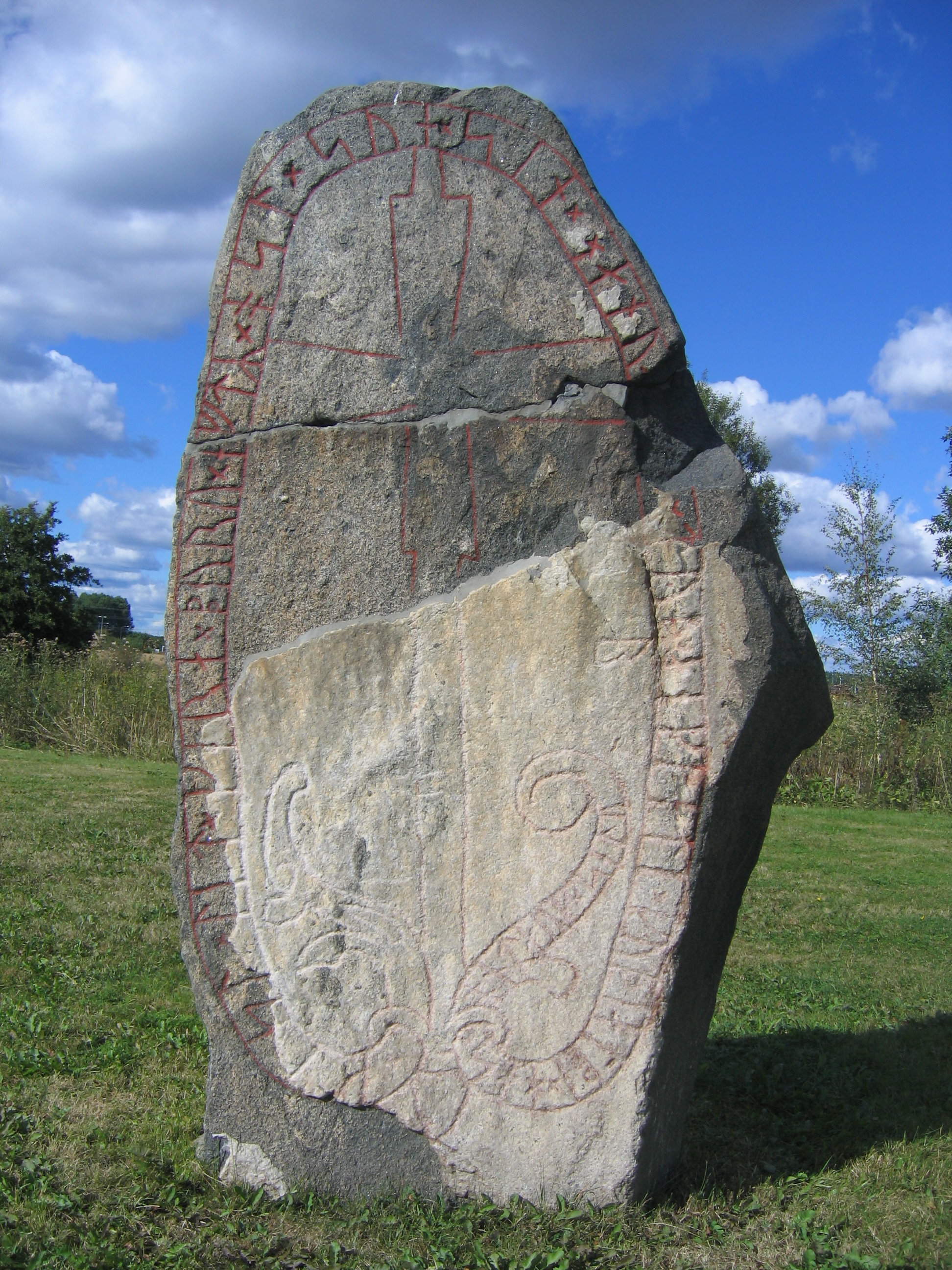 runestone Vs 9 at Saltängsbron, Västerås.